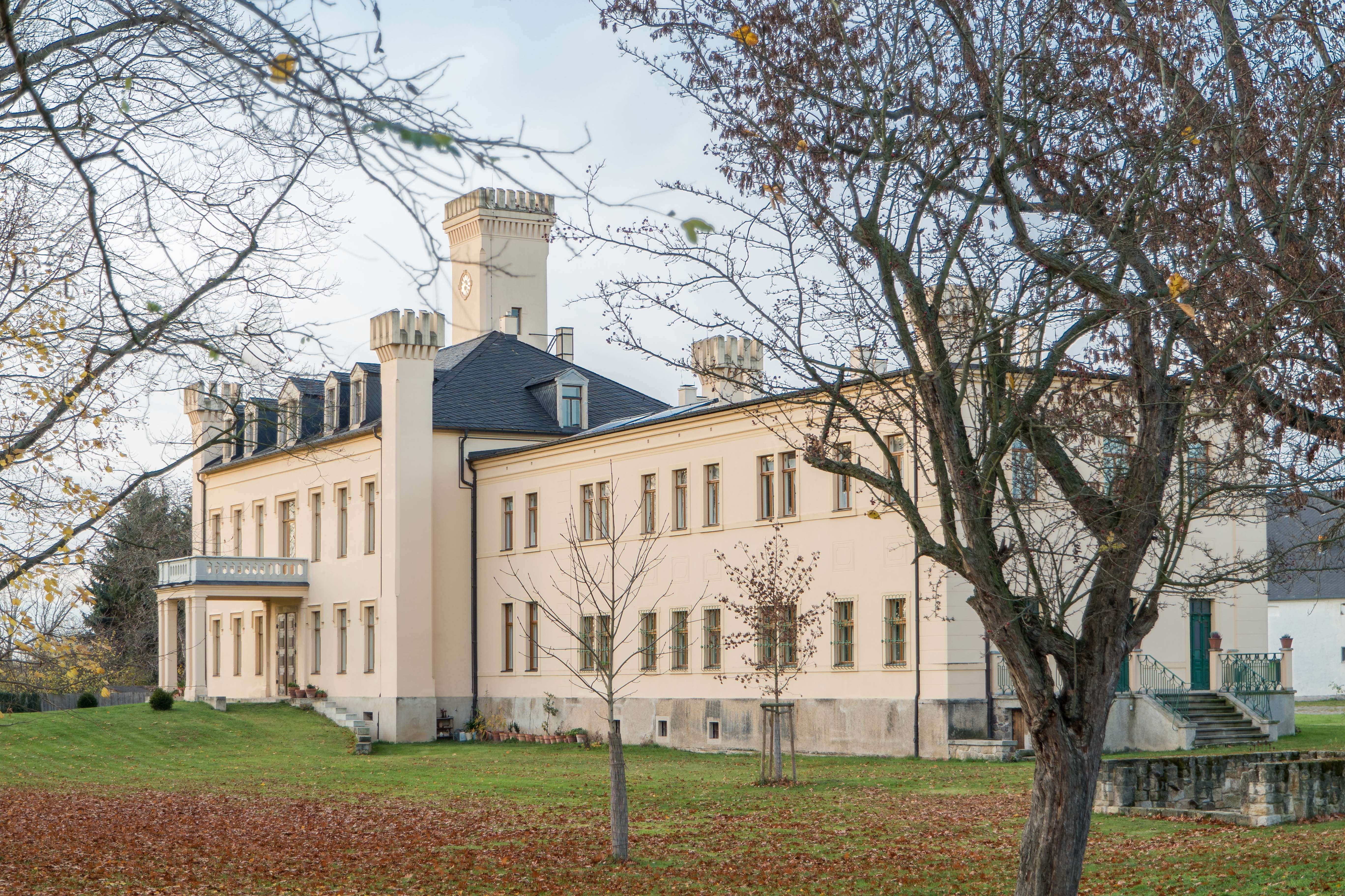 Schloss Pülswerda, Schlosshof 2 in Arzberg OT Pülswerda